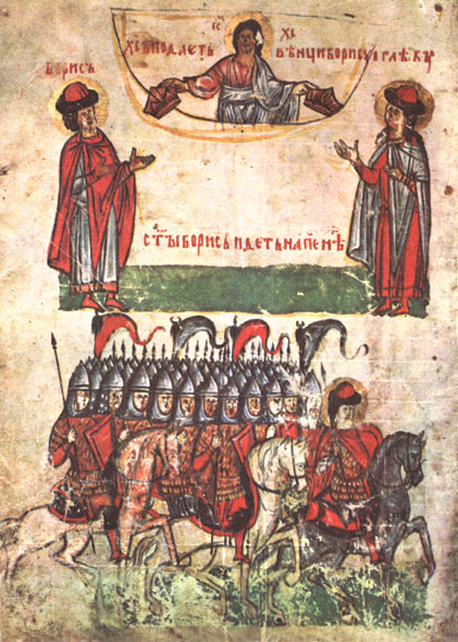 «Сказание о Борисе и Глебе» . Лицевые миниатюры из Сильвестровского сборника XIV века. 1. Борис и Глеб удостаиваются Иисусом Христом мученических венцов. 2. Борис идет на печенегов.